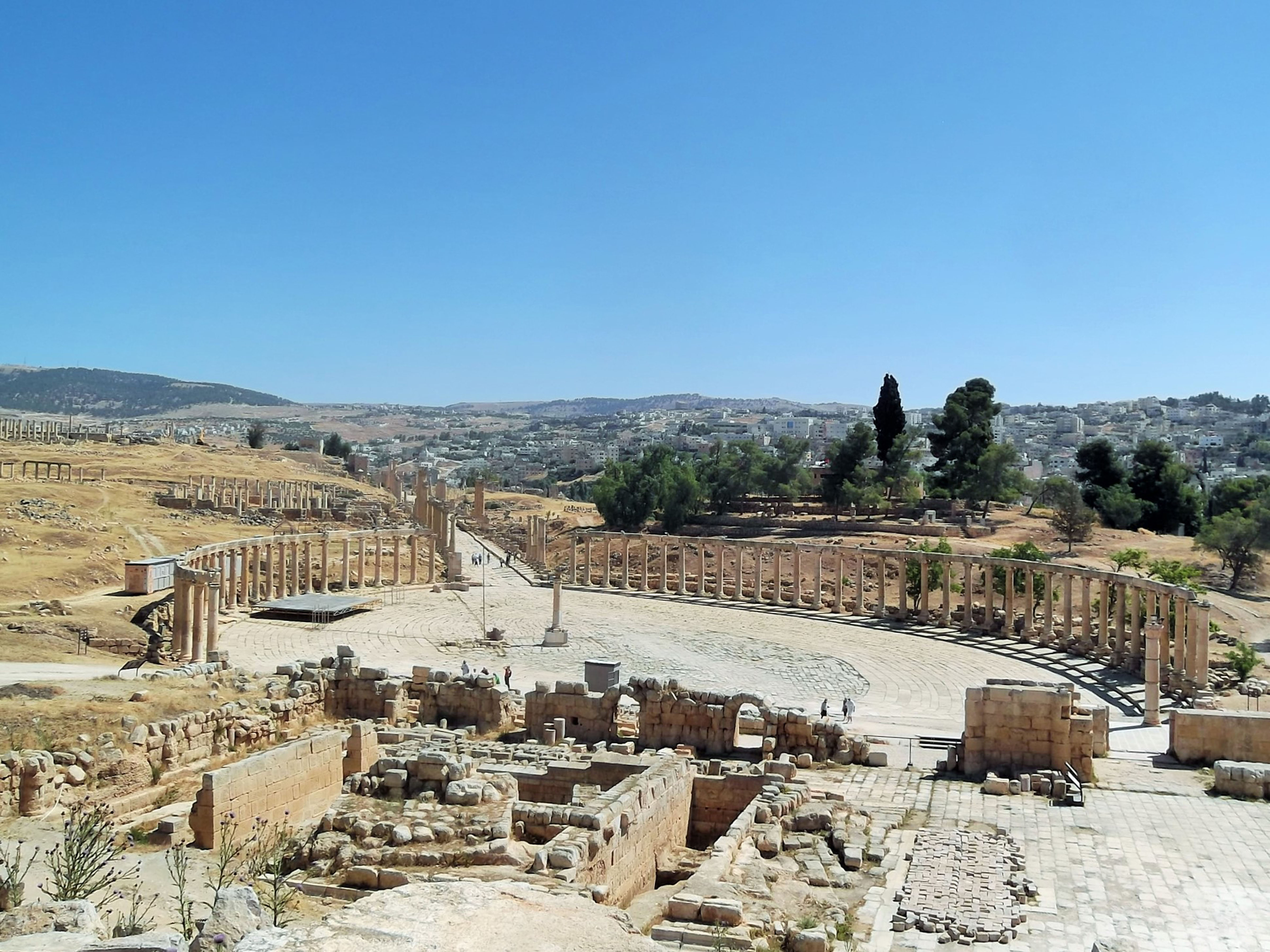 الساحة البيضاوية وشارع الأعمدة في جرش الرومانية، الأردن.